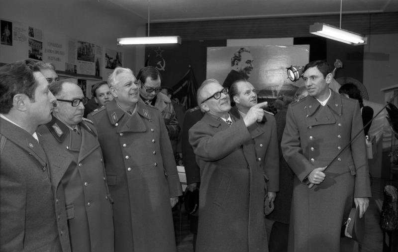 Jahrestag der Sowjetarmee, Besuch Erich Honecker ADN-ZB/Koard 20.2.78 Frankfurt/Oder: Truppenbesuch Zum 60. Jahrestag der Sowjetarmee und der Seekriegsflotte der UdSSR besuchte am 20.2. der Generalsekretär des ZK der SED und Vorsitzende des Staatsrates der DDR, Erich Honekcer (M.), ein Garde-Mot.-Schützenregiment der GSSD. Im Zimmer des Kampfesruhmes wurde er mit den Traditionen, dem ruhmreichen Kampfweg des Truppenteils im Großen Vaterländischen Krieg und den engen Waffenbrüderschaftsbeziehungen zur NVA vertraut gemacht. 3.v.l. Armeegeneral Jewgeni Iwanowski. [2.v.l. : Erich Mielke] Abgebildete Personen: Mielke, Erich: Minister für Staatssicherheit, Armeegeneral, Politbüro des Zentralkomitees (ZK) der SED, DDR (GND 118977490) Honecker, Erich: Staatsratsvorsitzender, Generalsekretär des ZK der SED, DDR (GND 118553399) Iwanowski, Jewgeni Filipowitsch: Armeegeneral, Oberkommandierender der Gruppe der sowjetischen Streitkräfte in Deutschland (GSSD), Sowjetunion